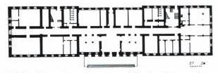 БДСГА. 4-ы корпус. План першага паверха.